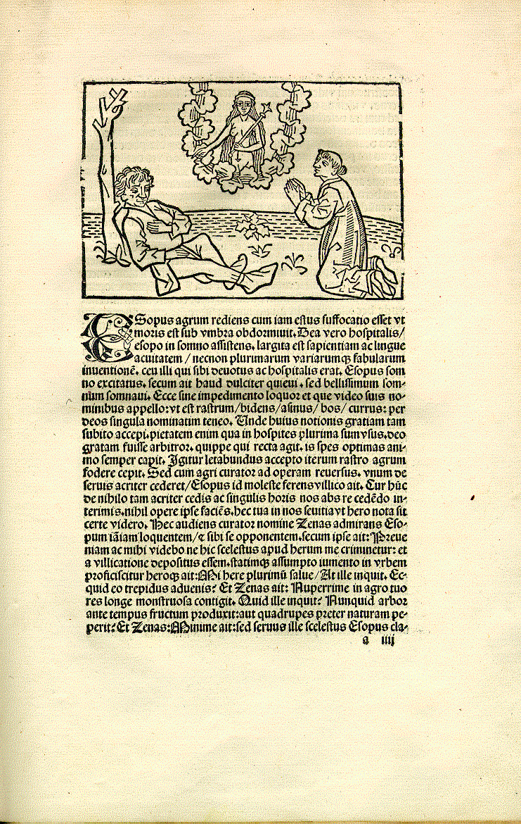 Sebastian Brant, Aesopus-Additiones, Seite 7 Der Beschreibungstext lautet: "S. 7 Äsop erhält im Schlaf von der Göttin der Gastfreundschaft die Gabe kluger Rede zum Dank dafür, daß er einen reisenden Priester bewirtet hat."